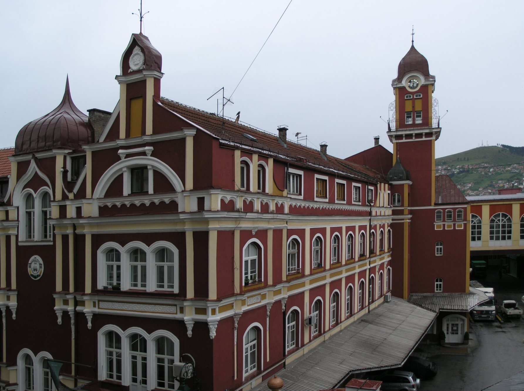 BiH, Sarajevo - brewery